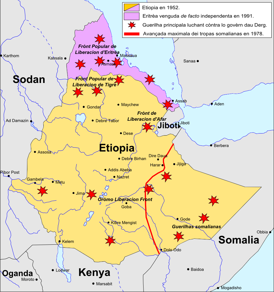 Guèrras dau periòde Mengistu.